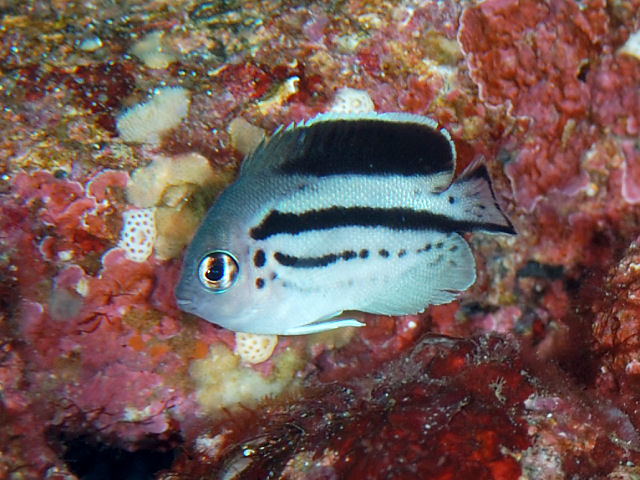 タテジマヤッコ Genicanthus lamarck